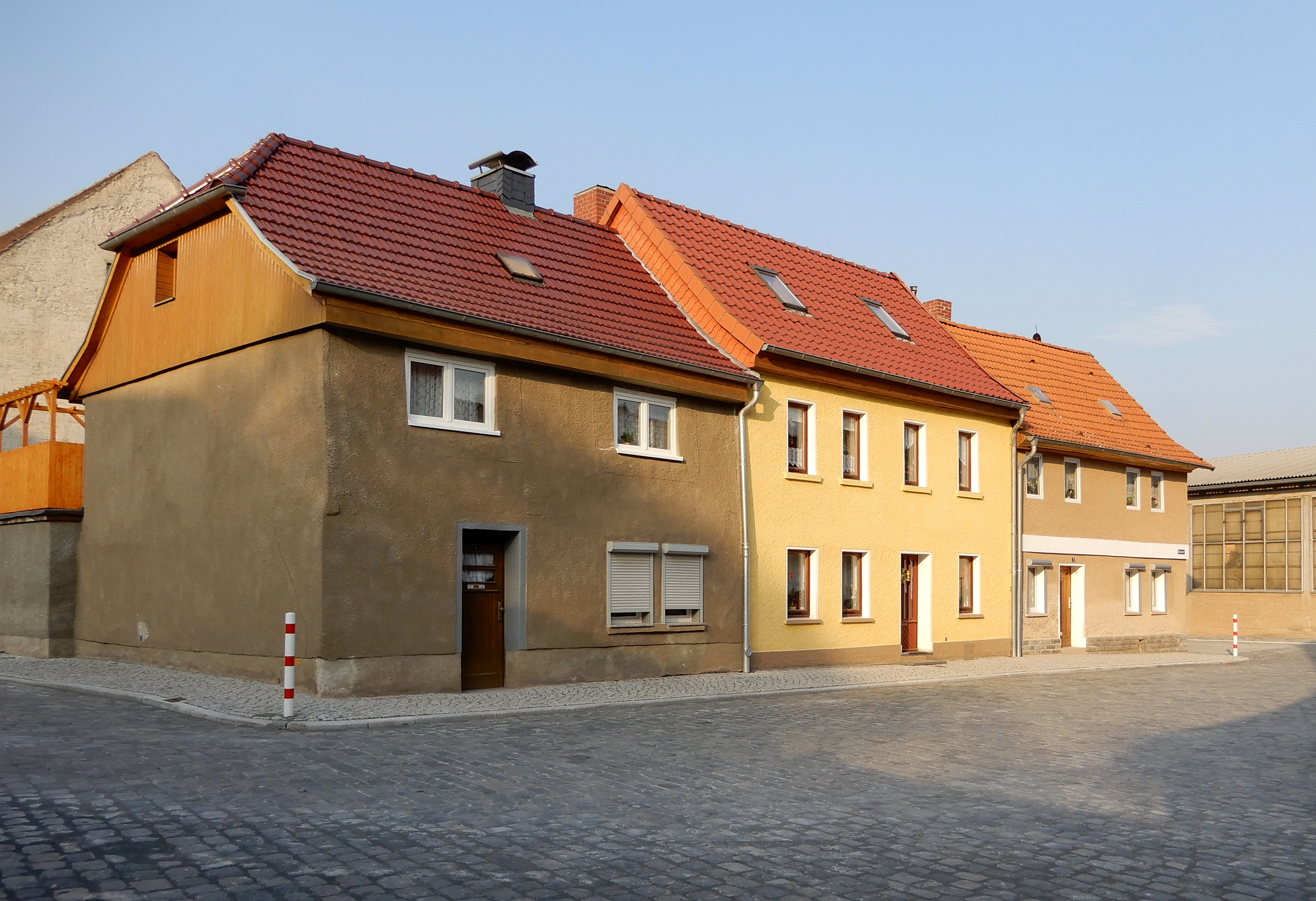 Gebäude Klosterhof 2-4 in Aschersleben